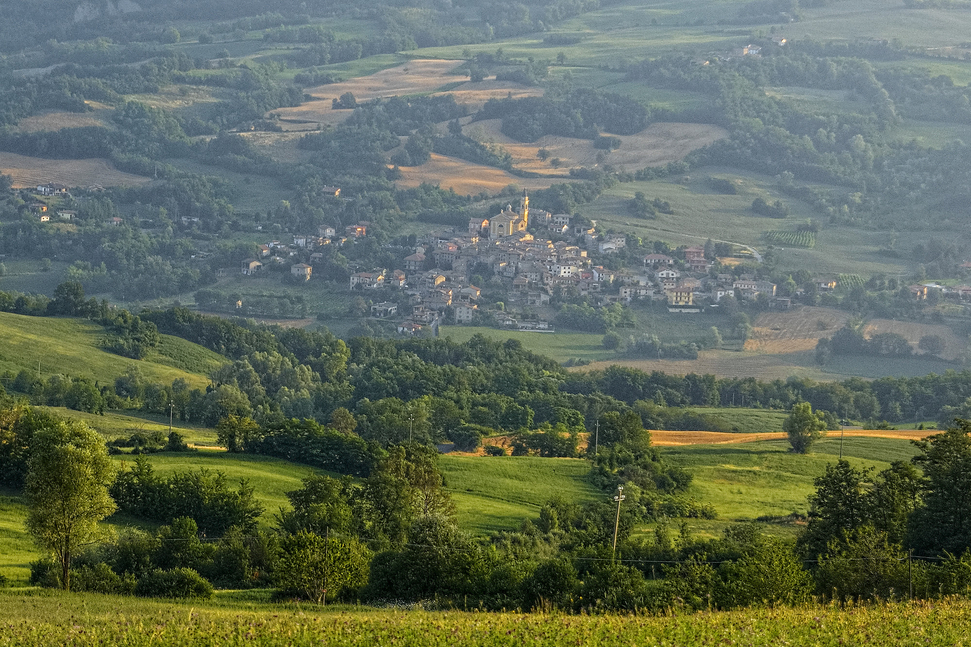 Caminata